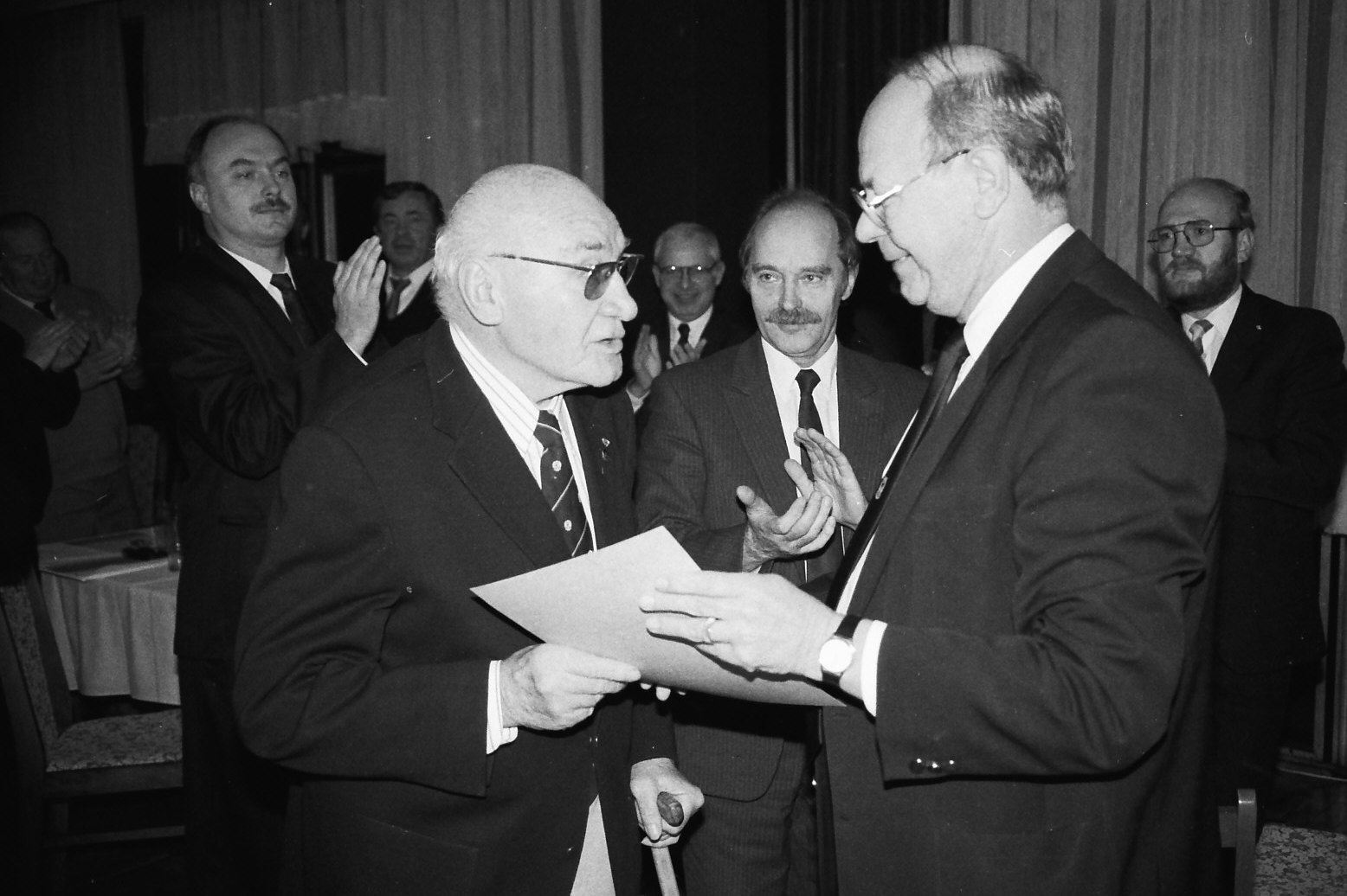 DRV-Präsident Willi Eckert ehrt den ersten DRSV-Nationaltrainer Erwin Thiesies, Gert Scharn, DRSV-Präsident bis 1990 (Bildmitte)